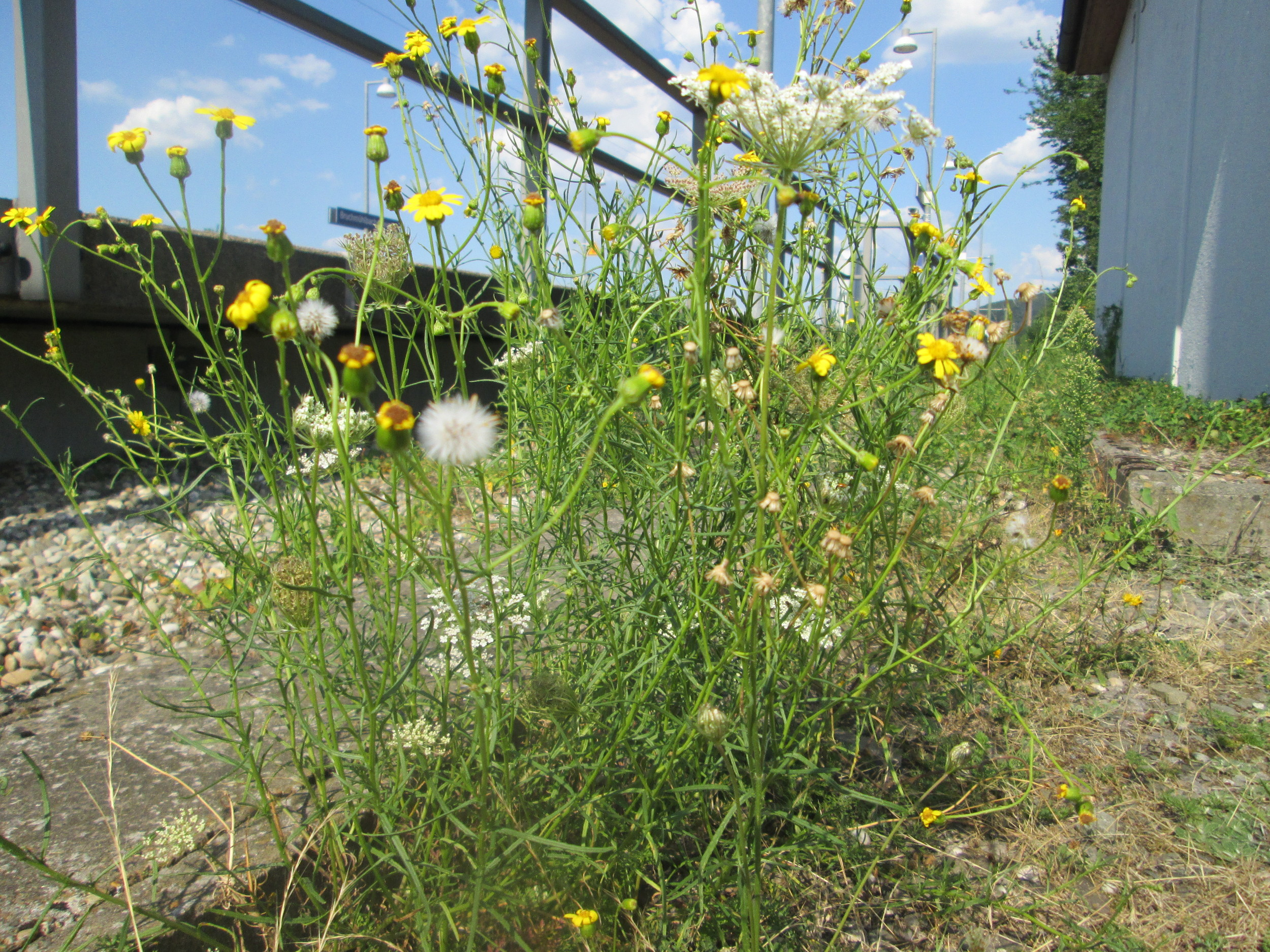 Schmalblättriges Greiskraut (Senecio inaequidens) am Bahnhof Bruchmühlbach-Miesau